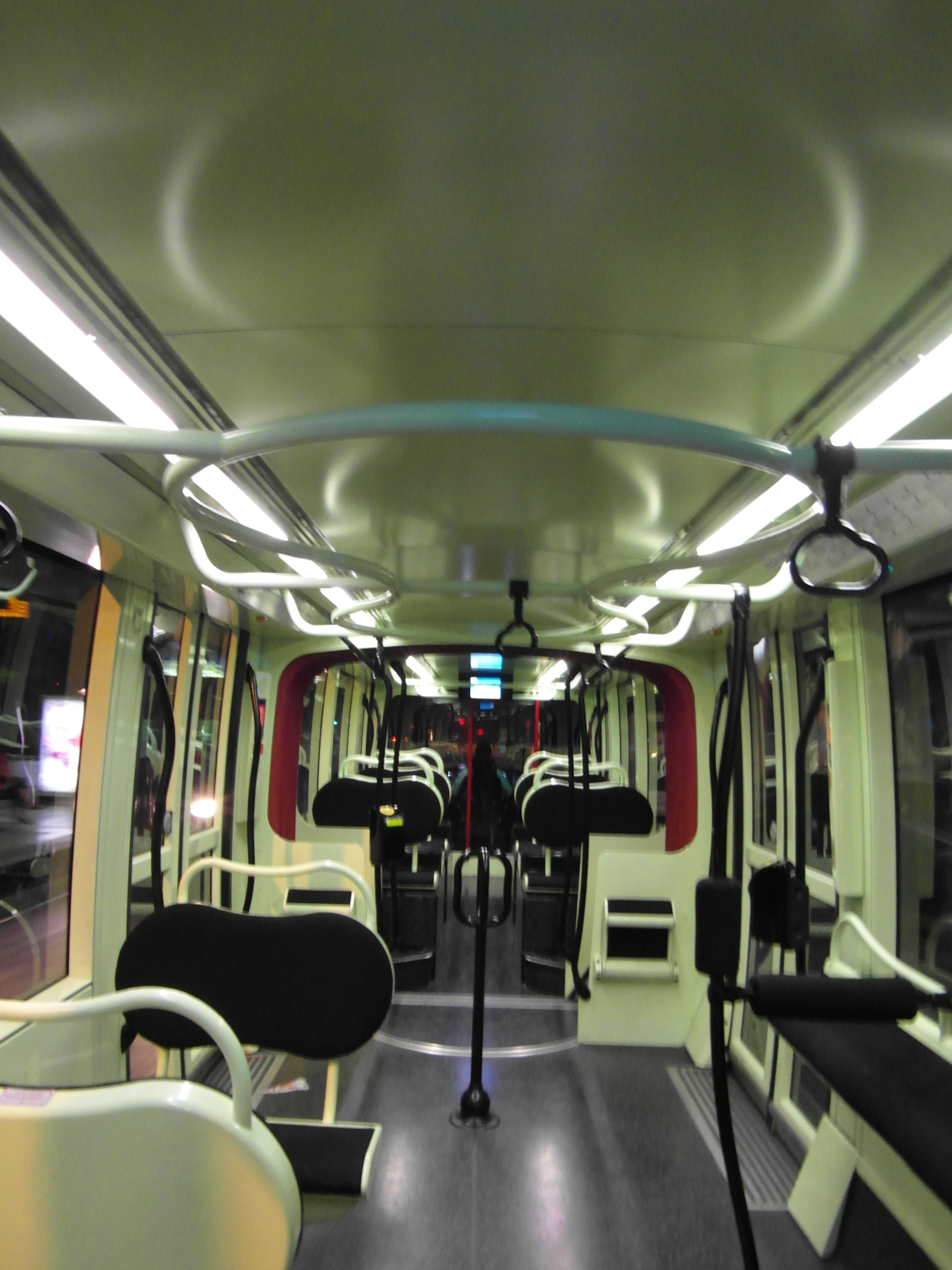 Details der Straßenbahnfahrzeuge der Linie 4